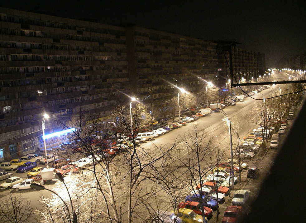 Pantelimon Avenue, in Pantelimon District, Bucharest, Romania